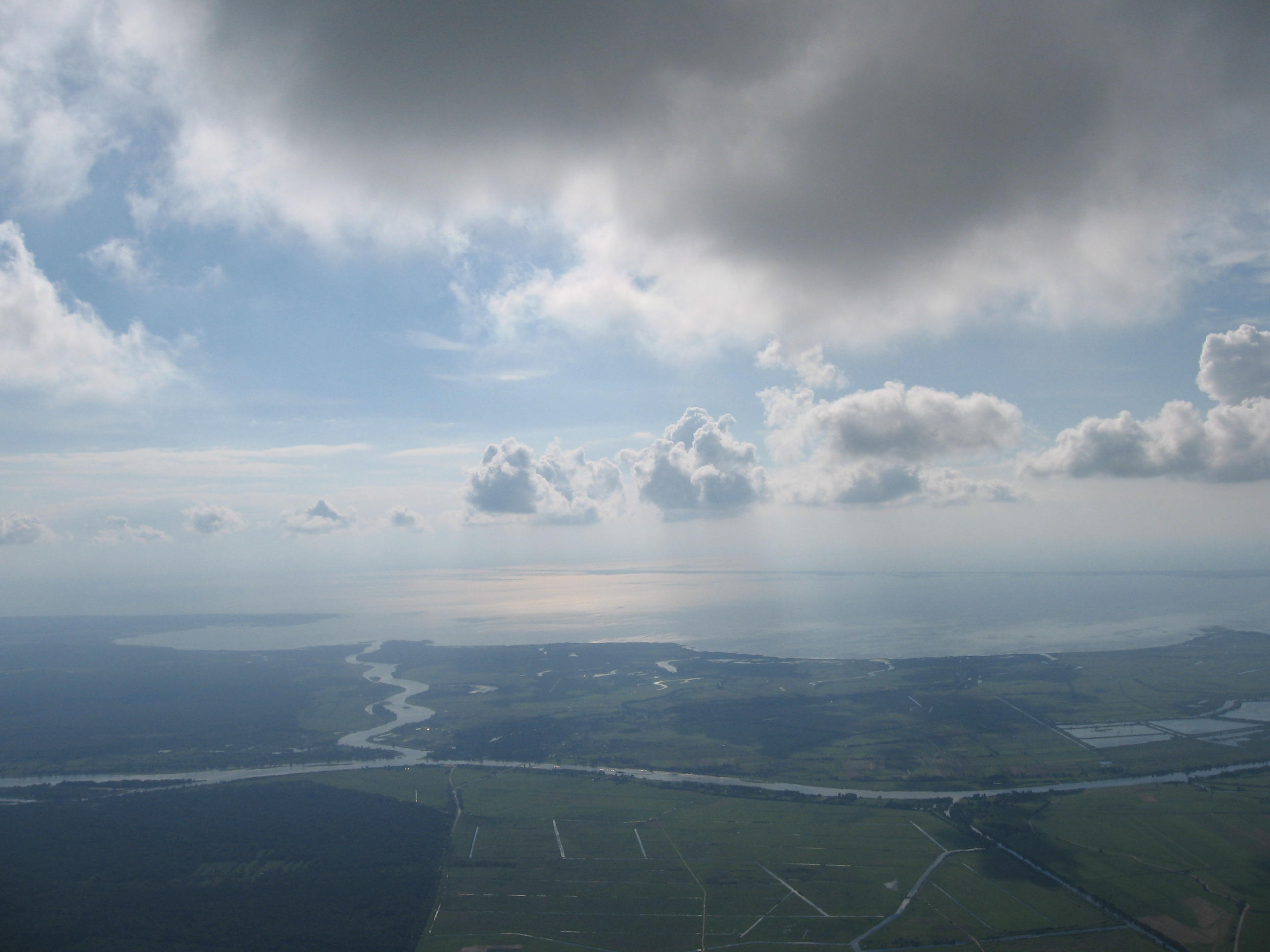 Rusnės sala ir Kuršių marios